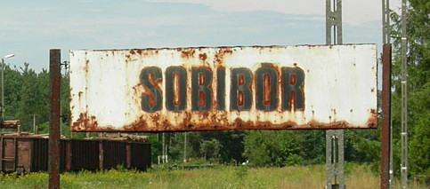 Schild des Rangierbahnhofes der Häftlingstransporte von Sobibór